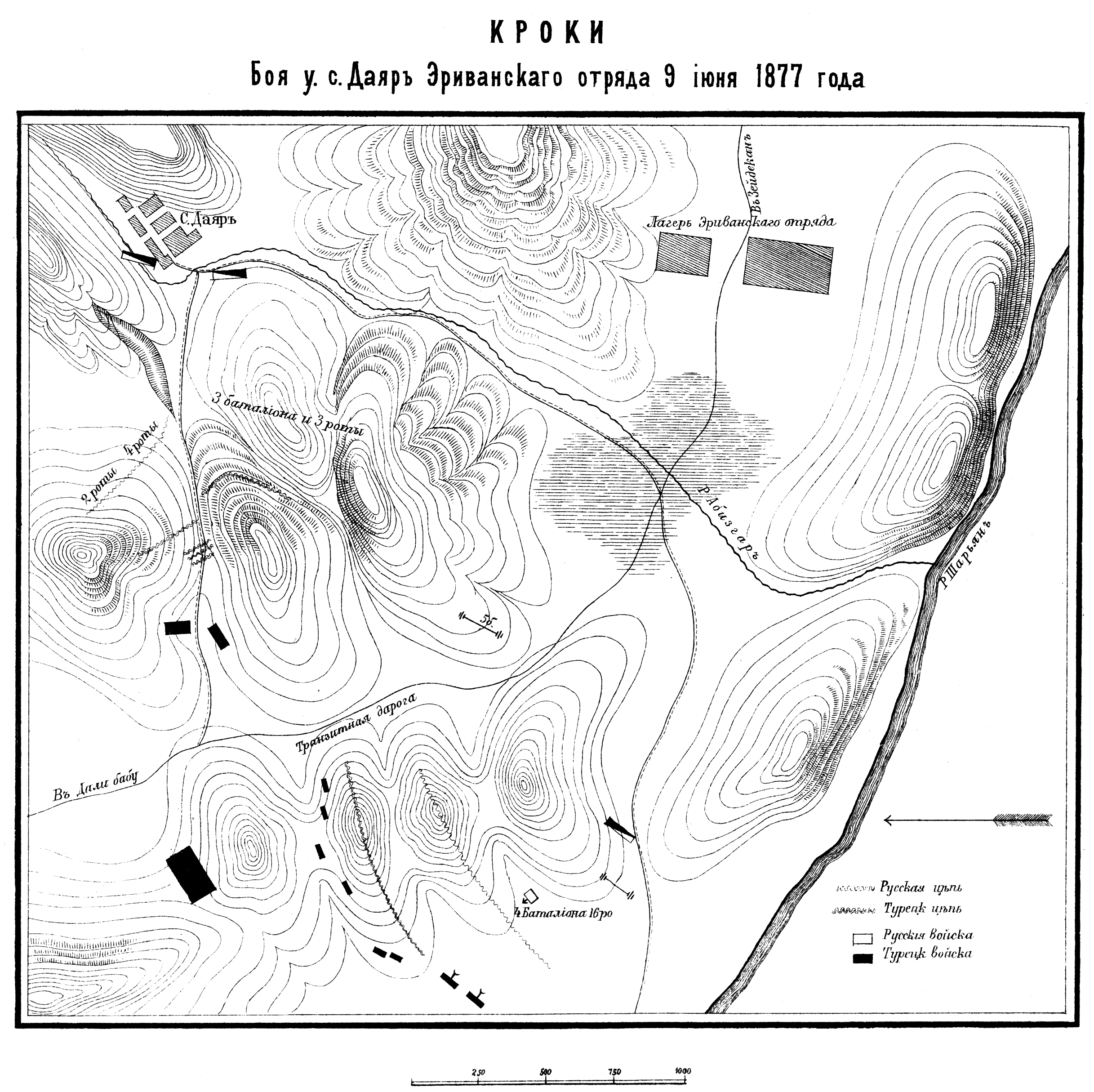 Бой у с. Даяр Эриванского отряда 9 июня 1877 года.